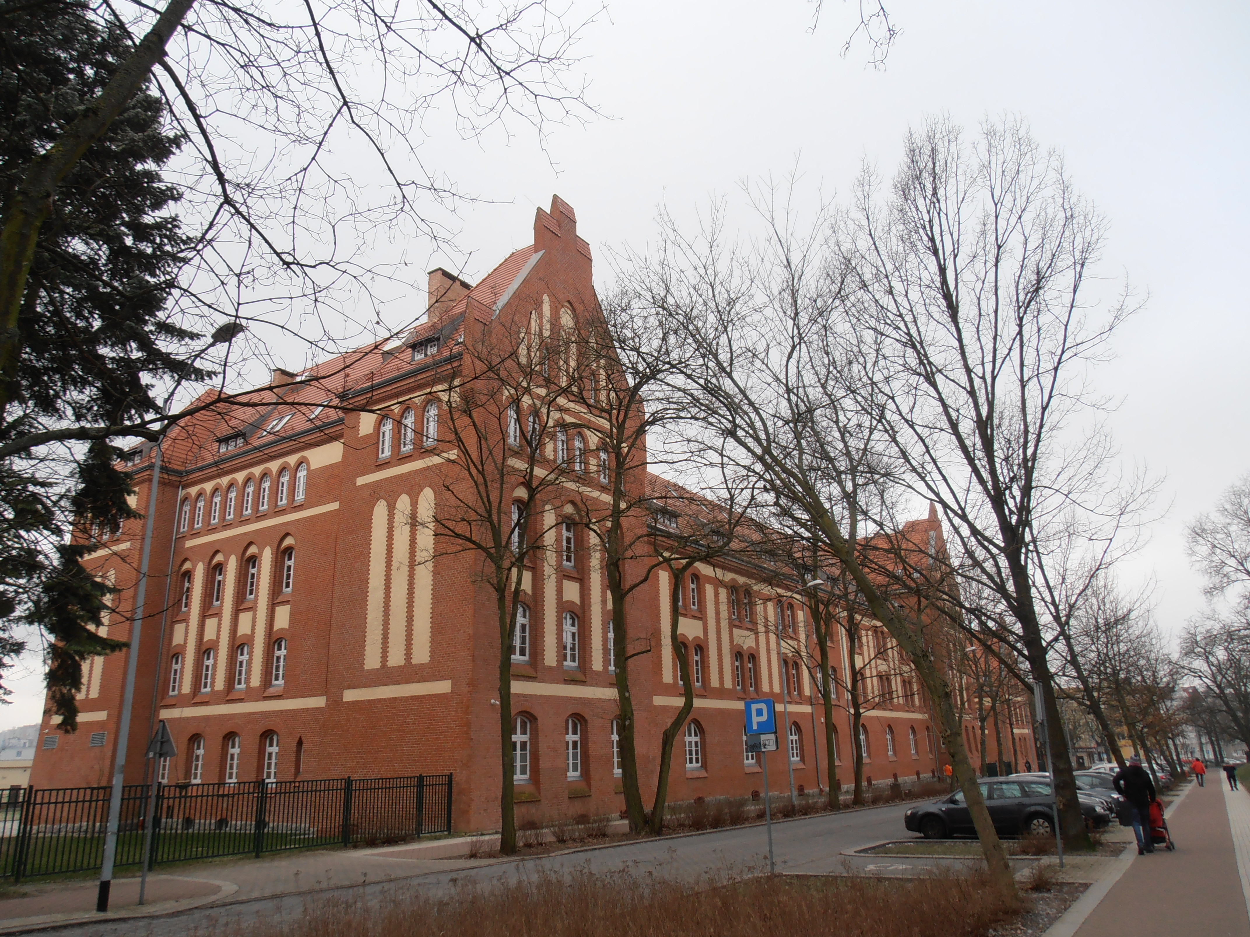 Gmach Wydziału Filologicznego Uniwersytetu Szczecińskiego, 2018